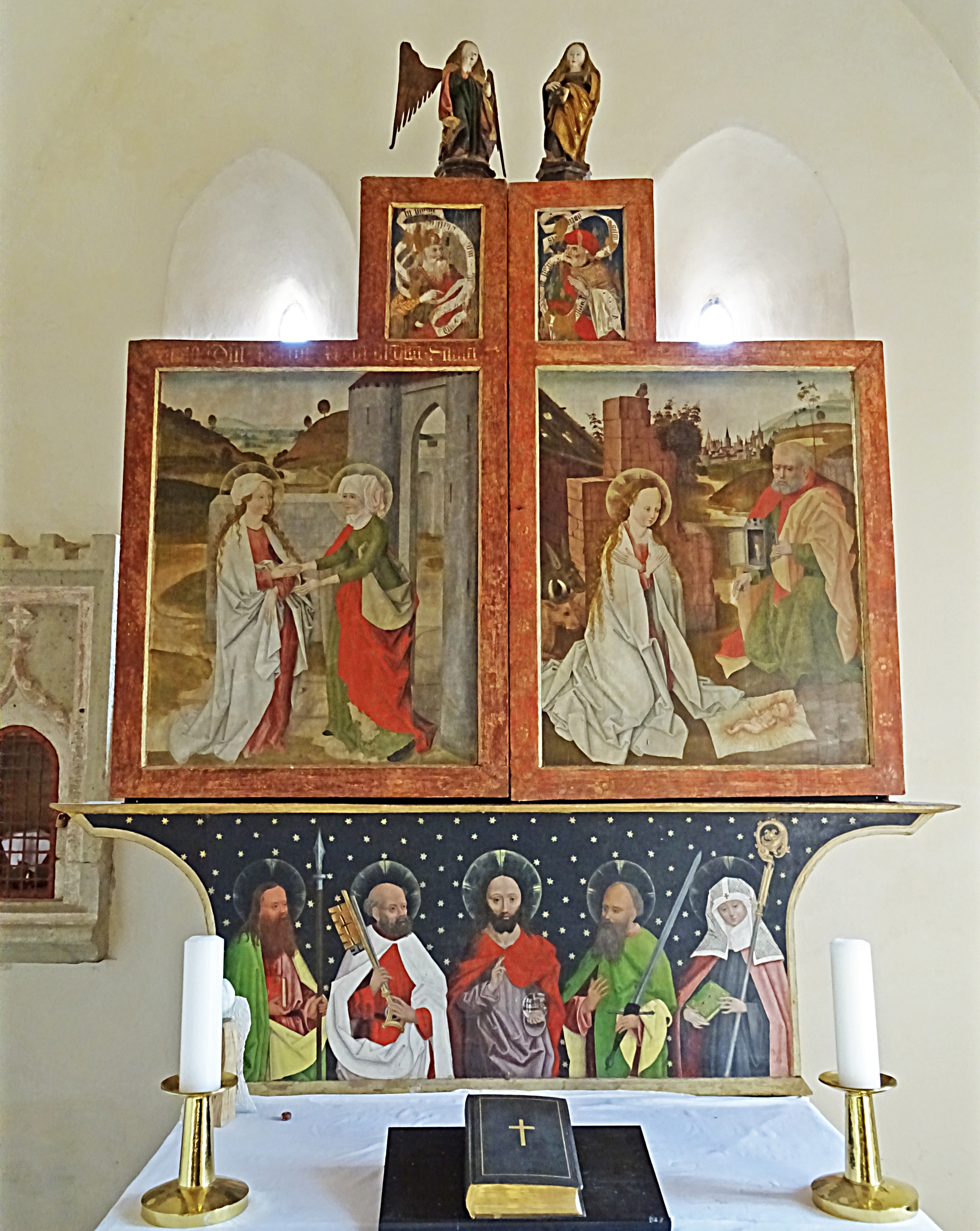 Zeigerheimer Altar aus Saalfelder Schule (um 1490) in der Wehrkirche Zeigerheim (Rudolstadt). Die Malereien auf der Werktagsseite an den Außenseiten der Flügel zeigen die Heimsuchung und Geburt Jesu sowie auf den Aufsatzbrettern David und Jesaias